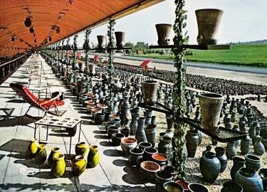 Exposition de céramiques d'Accolay à Appoigny, France